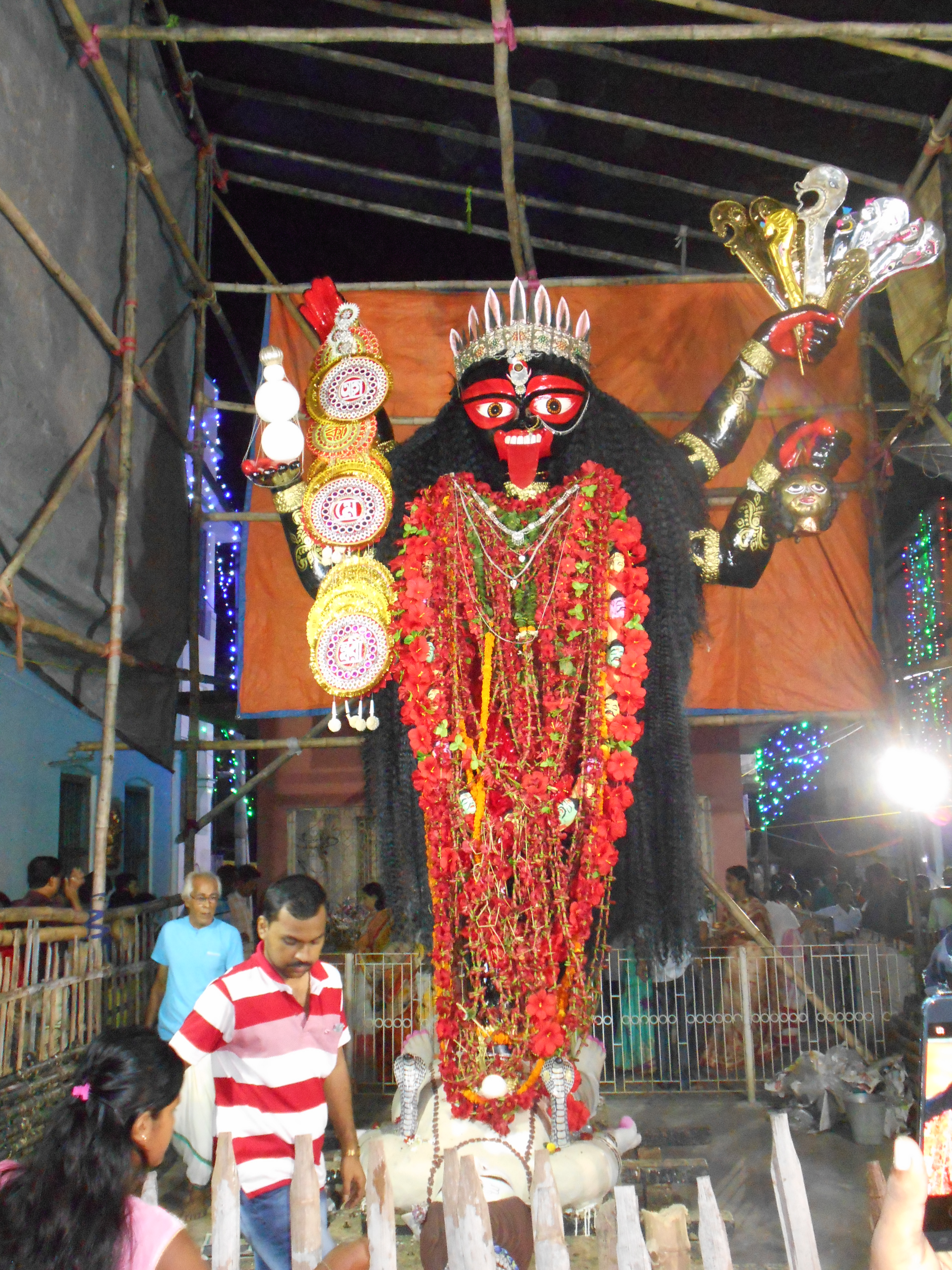 কৃষ্ণানন্দ আগমবাগীশ প্রবর্তিত নবদ্বীপ আগমেশ্বরী মাতা